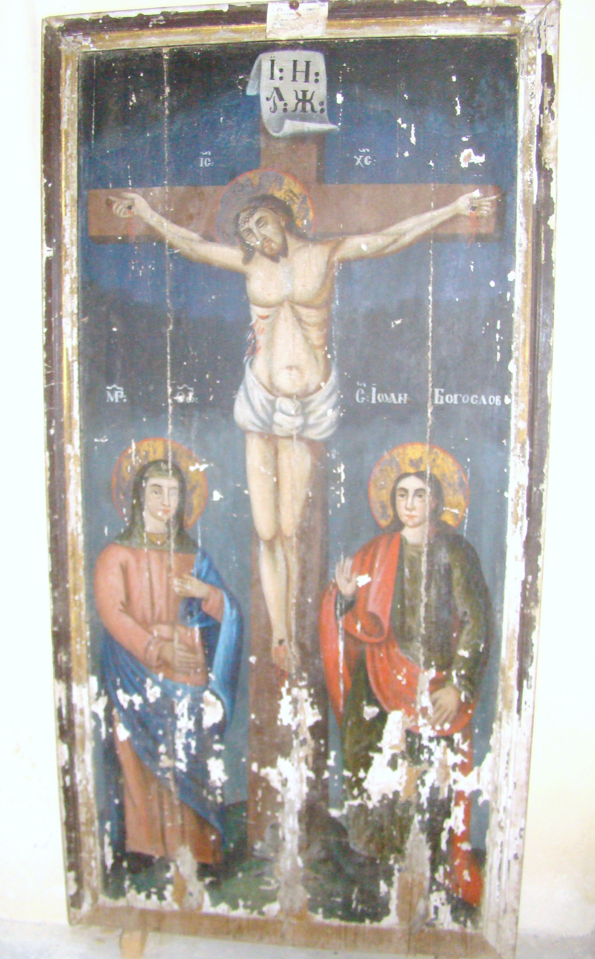 Biserica „Nașterea Născătoarei de Dumnezeu" din Hălmagiu, județul Arad